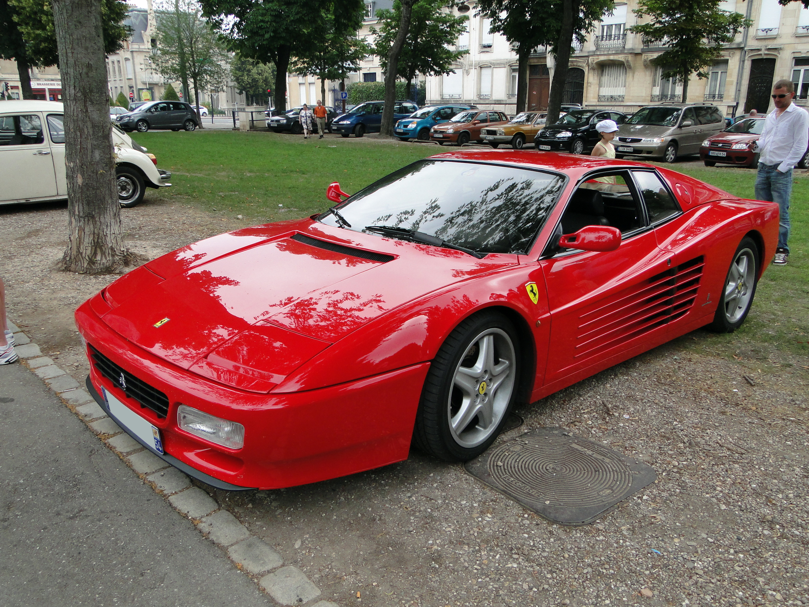 Ferrari Testarossa